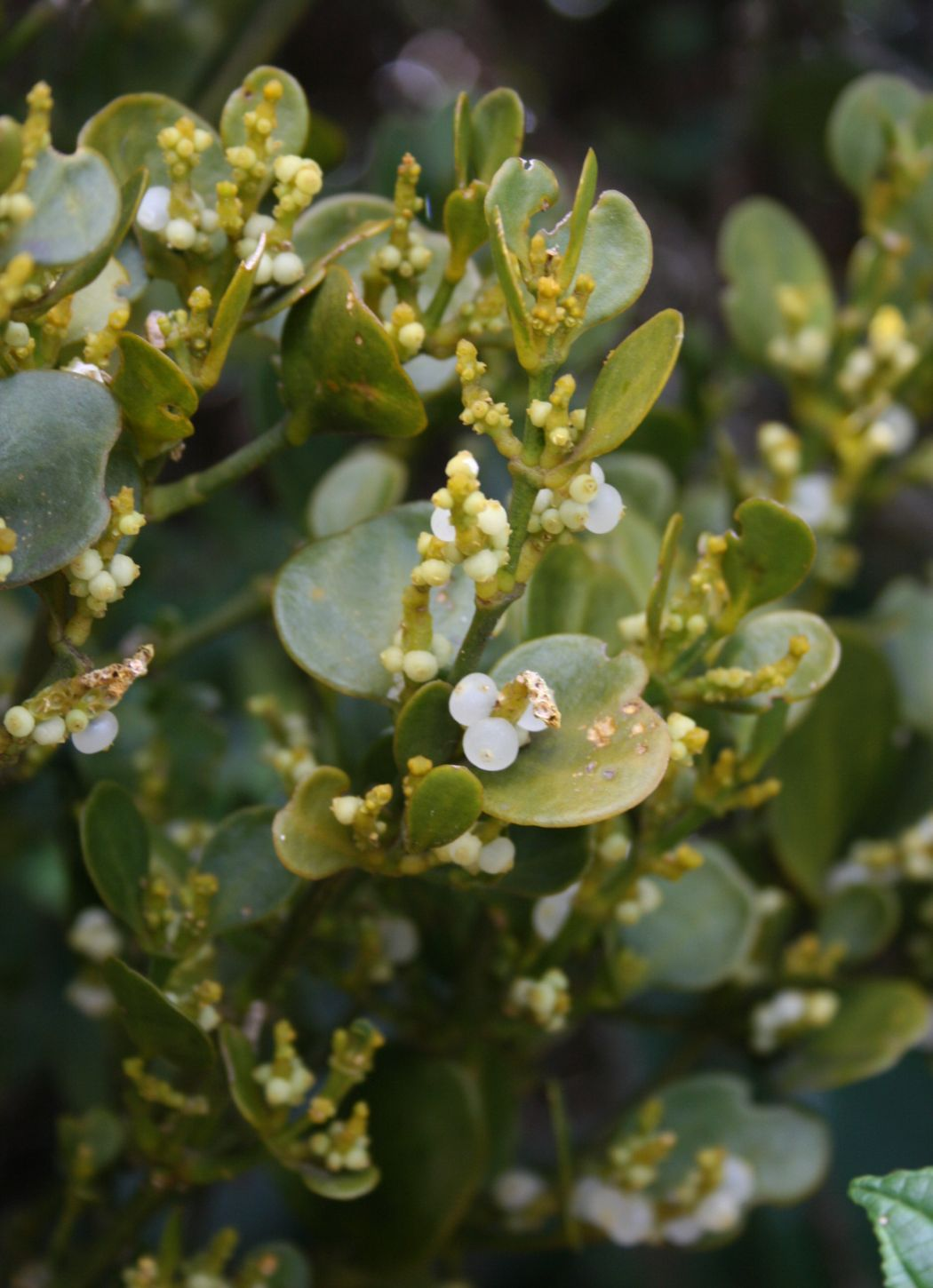 Dendrophthora costaricensis, Sandelholzgewächse (Santalaceae) - Costa Rica: Prov. Alajuela, Parque Nacional Volcán Poás, auf Gaultheria sp. 2550-2600 m